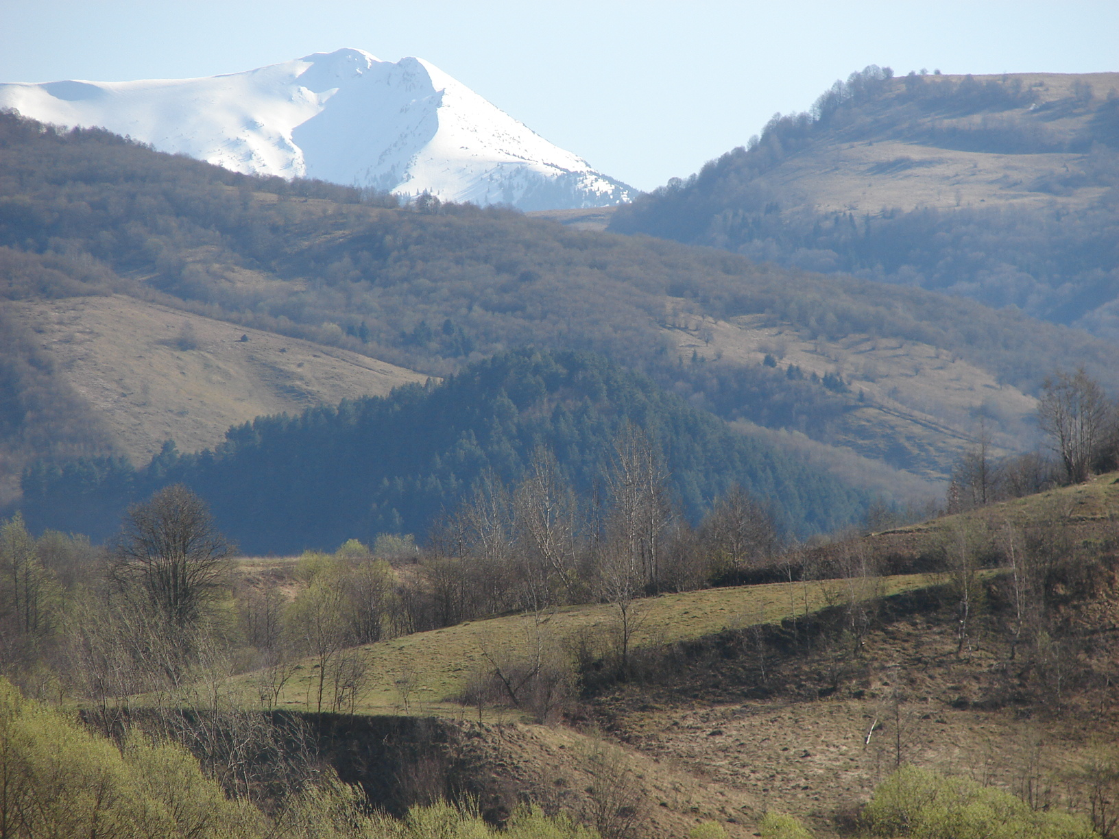 Tiblesul vazut de la intrarea in Dragomiresti(Josani)